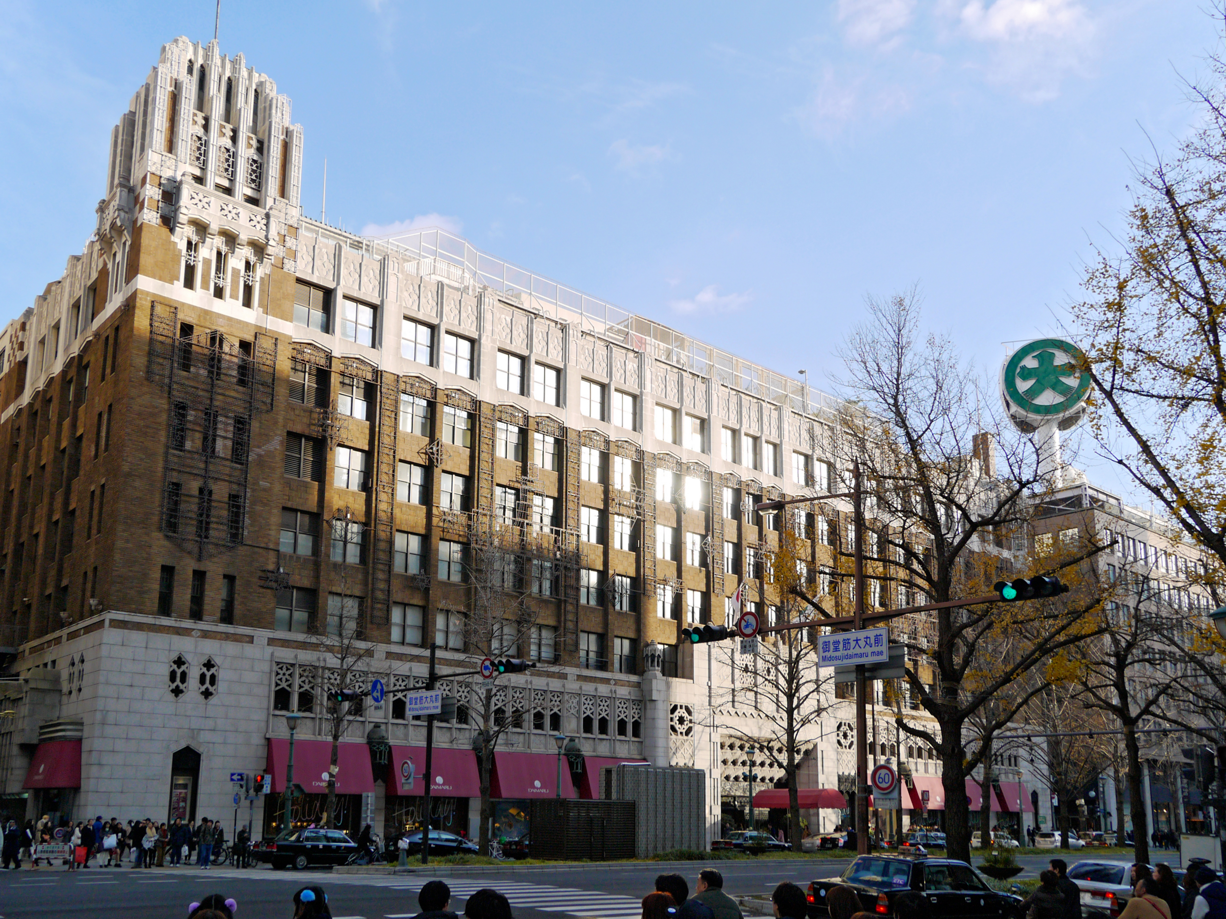 Daimaru Shinsaibashi store (大丸心斎橋店), Osaka, Osaka prefecture, Japan